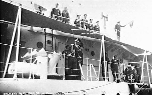 Alexander I of Yugoslavia at the rail of the ship Dubrovnik in Split taking him on an official visit to France.